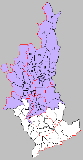 京都府愛宕郡の町村制時点の町村。